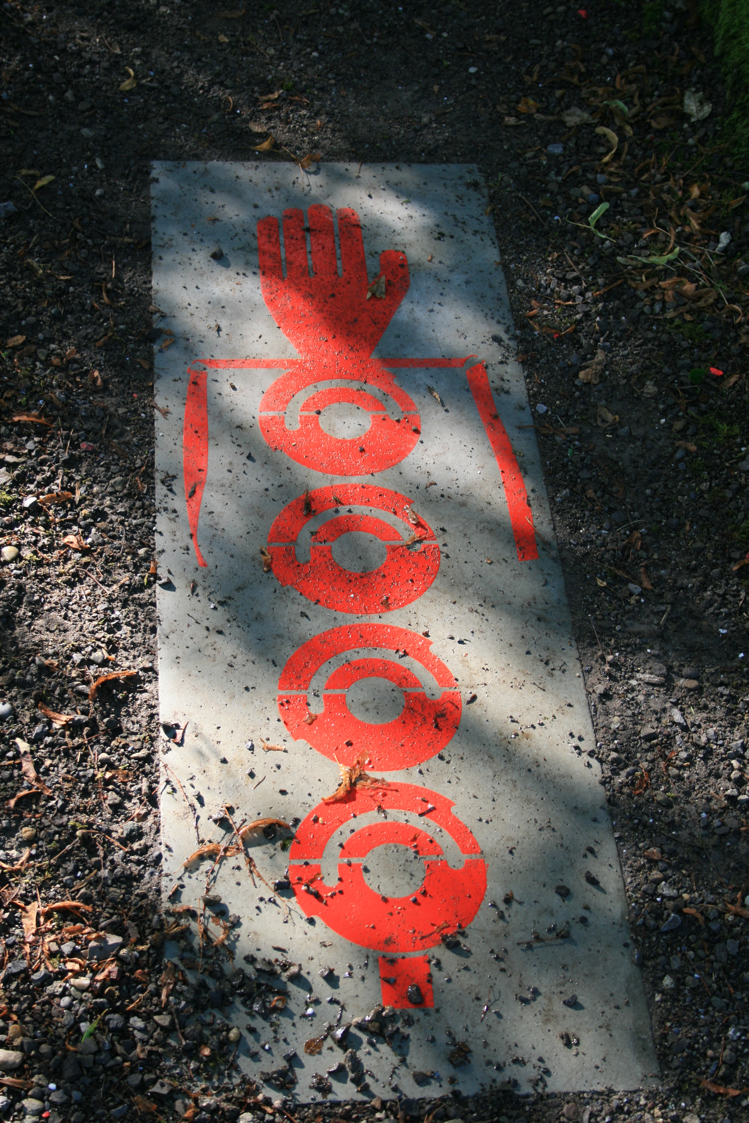 Wegweiser des Legionärspfads in Vindonissa (Windisch), Schweiz